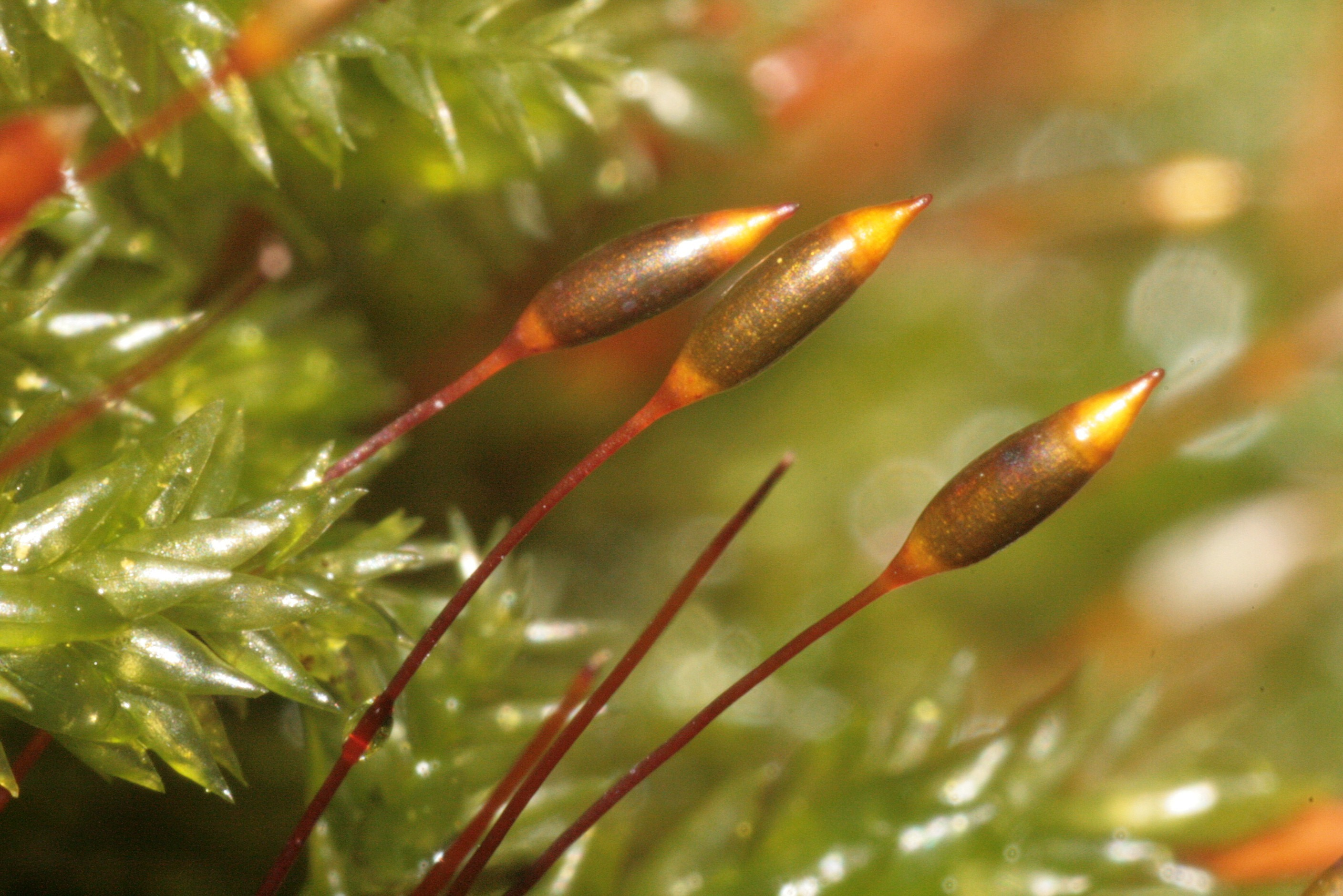 Isothecium alopecuroides, Sporenkapseln, Umgebung Hollenstein an der Ybbs, Niederösterreich, Austria